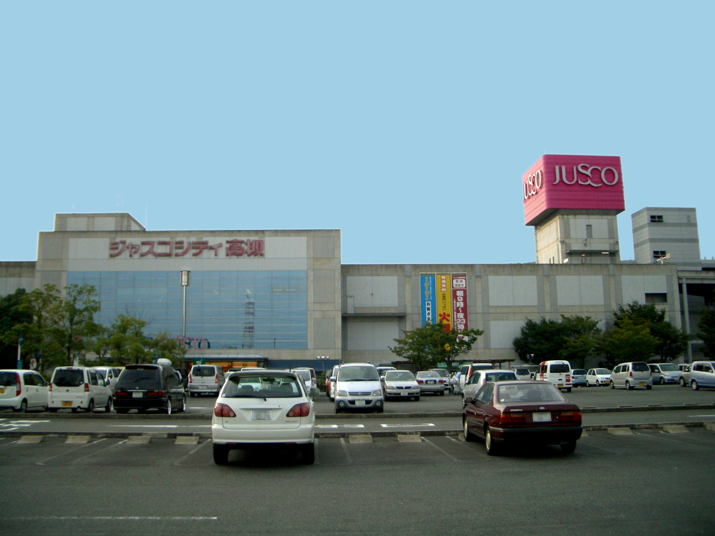 JUSCO City Takatsuki, Haginosho Takatsuki-City Osaka Japan.